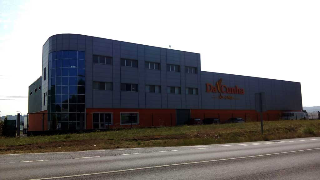 Da Cunha en Carral.